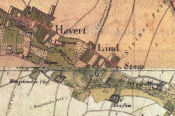 Kartenaufnahme der Rheinlande 1804/05